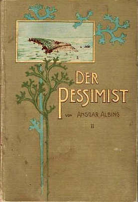 Paul de Mathies (auch Ansgar Albing) (1868-1924), deutscher katholischer Priester und Schriftsteller, Buchcover, 1899